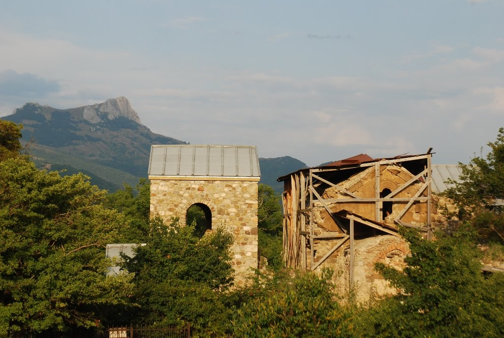 გუმბათიანი ეკლესია